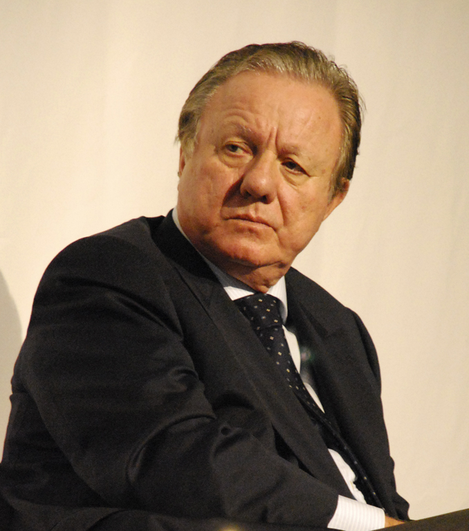 Altero Matteoli, Italian politician. Festival della Creatività 2009, Florence, Italy.